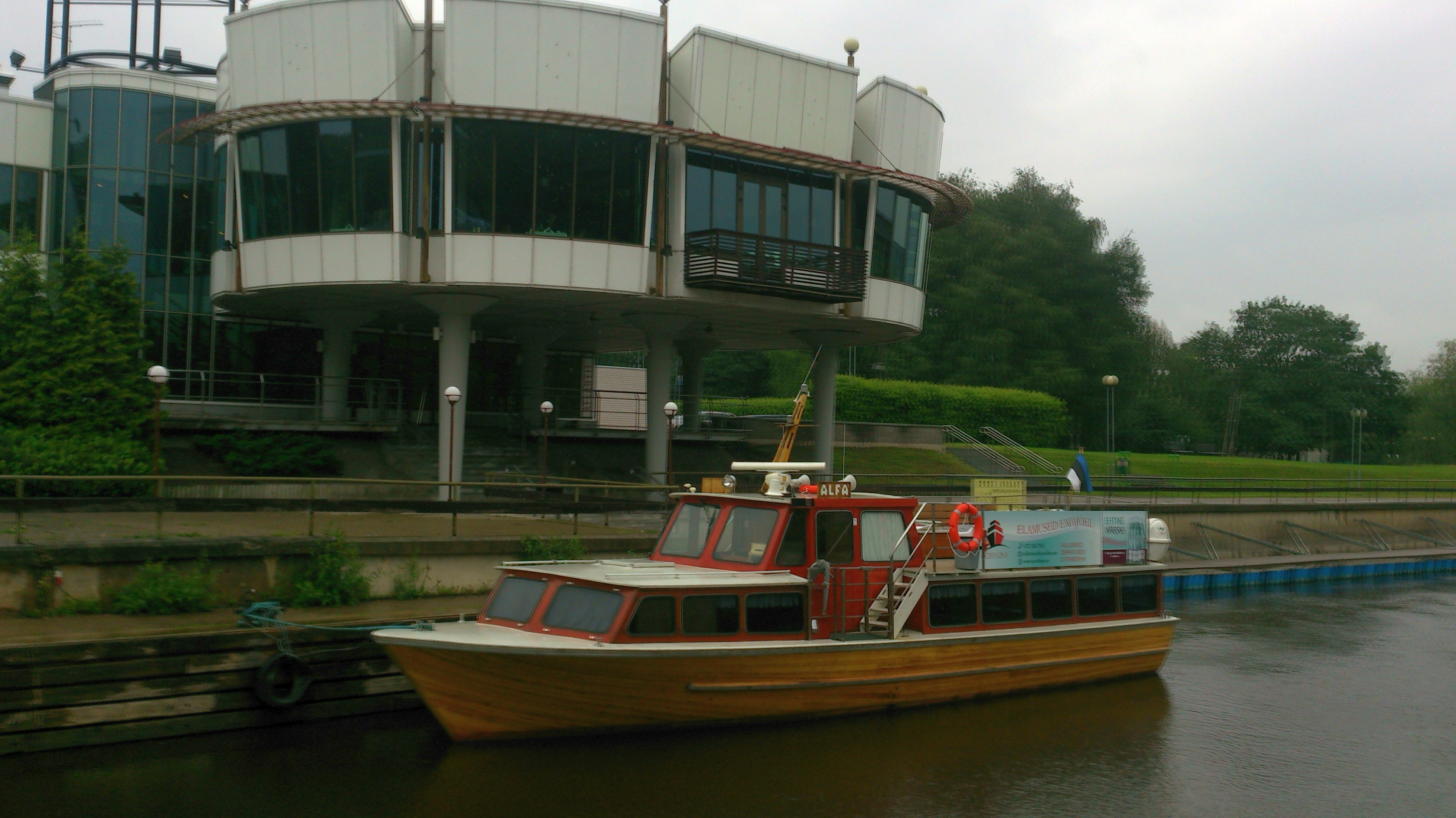 Jõelaev Alfa Emajõel Atlantise kai ääres, 29. juuni 2014